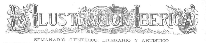 Tercer logotip de la revista La Ilustración Ibérica (Barcelona, 12 de gener de 1884) revista num.54